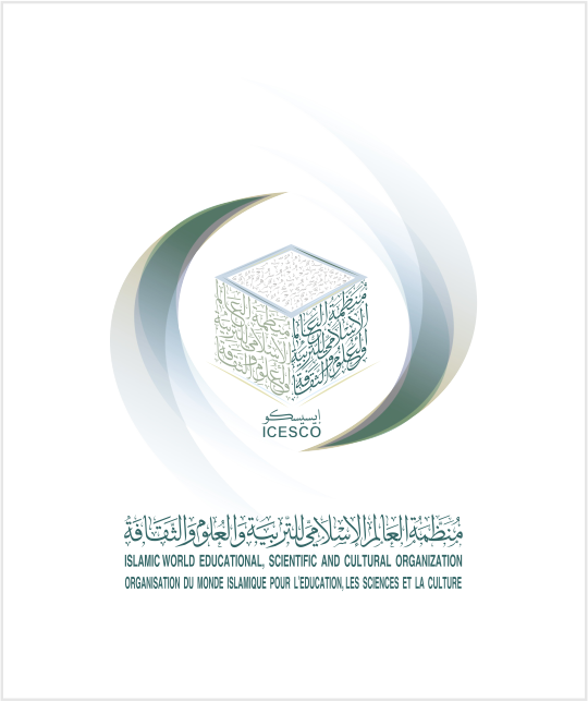 الشعار الجديد المعتمد لمنظمة العالم الإسلامي للتربية والعلوم والثقافة